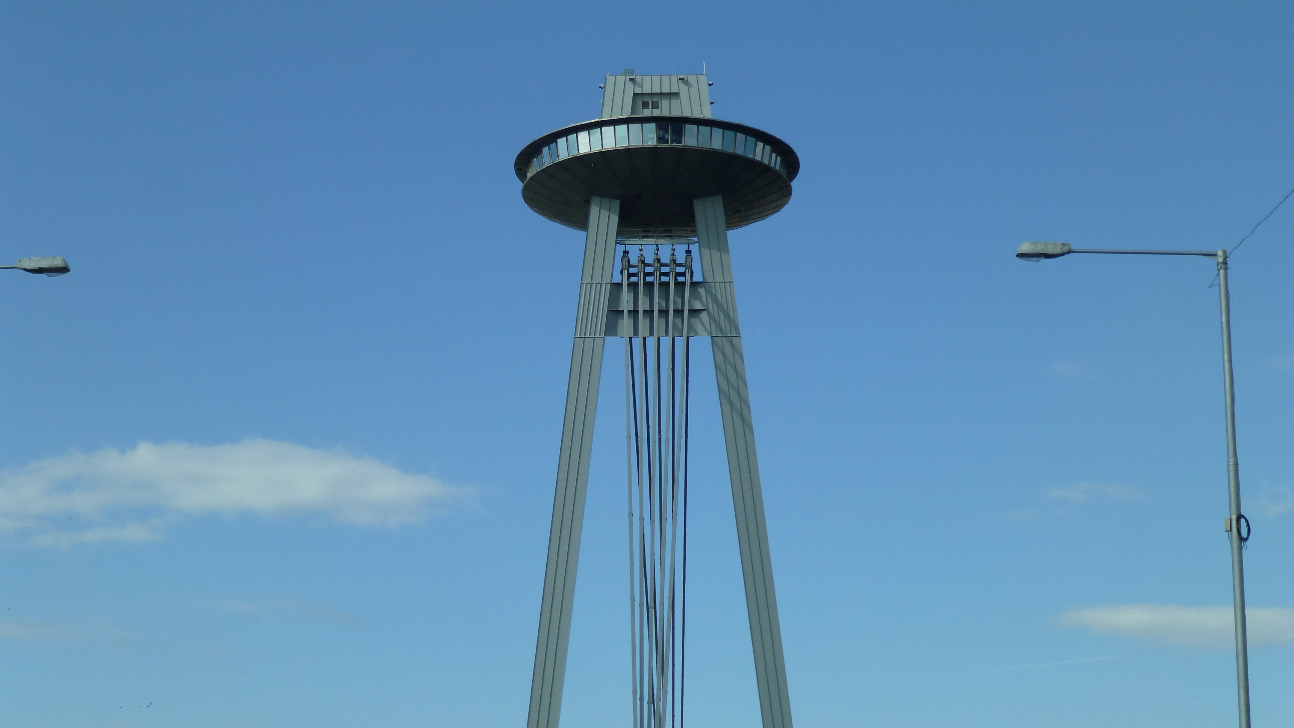 REŠTAURÁCIA UFO NA MOSTE SNP - RESTAURANT UFO ON BRIDGE SNP